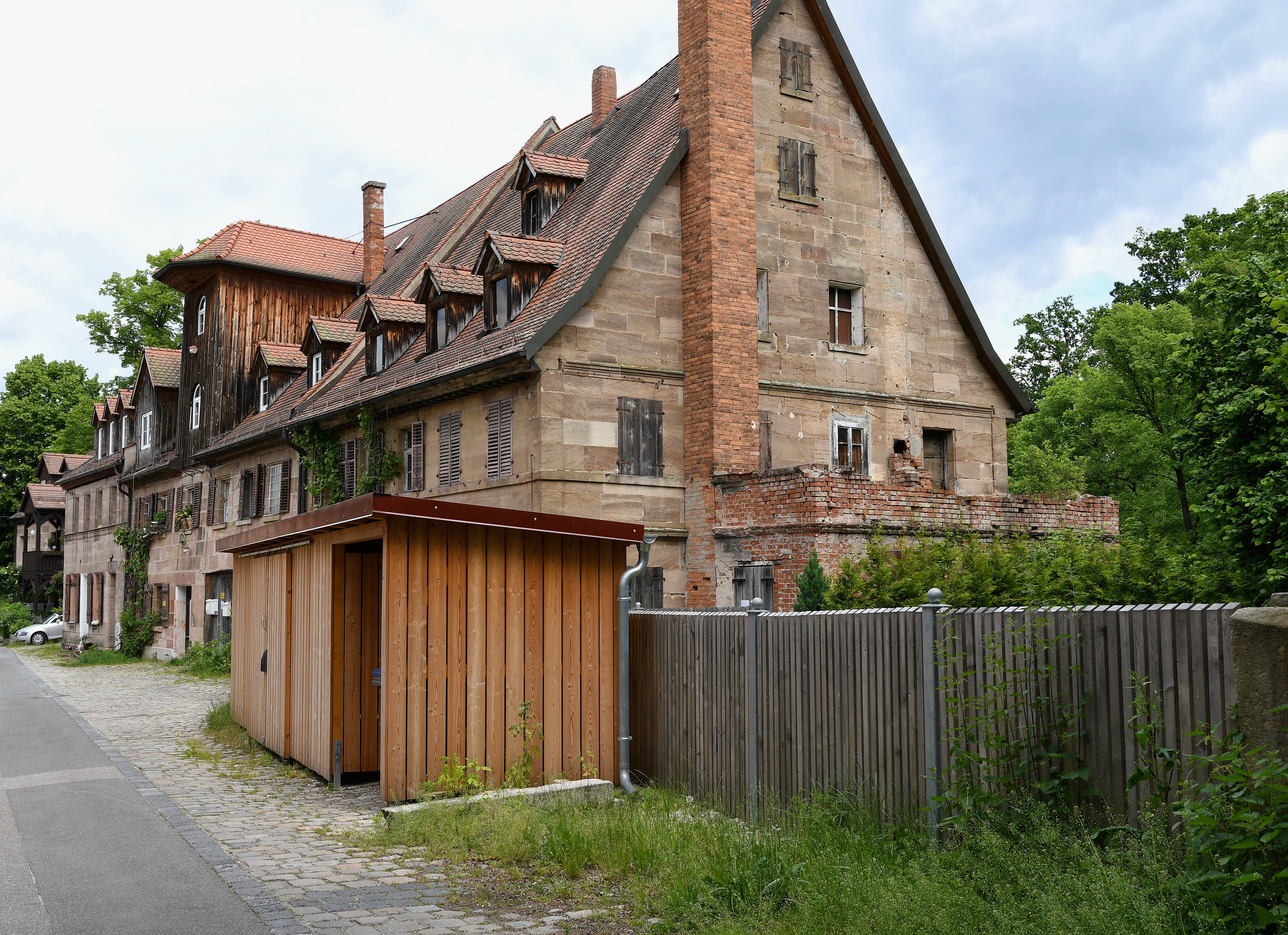 Gerasmühle im Rednitztal von Nürnberg